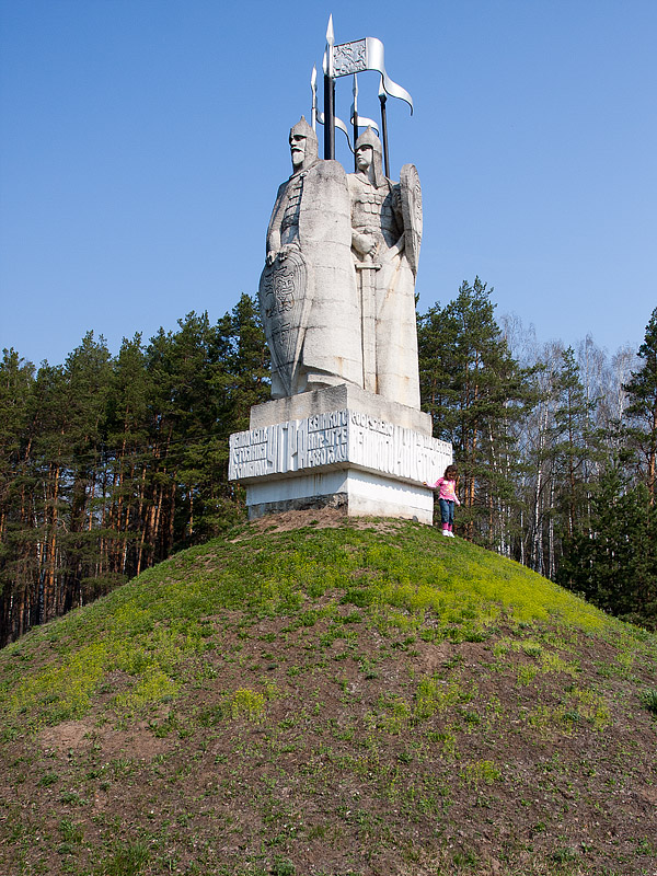 Памятник "Стояние на Угре 1480"